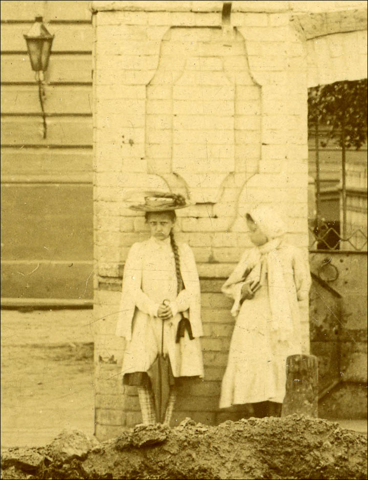 Сердитая девочка-фантом появляется на более чем 20 фотографиях дореволюционного Красноярска